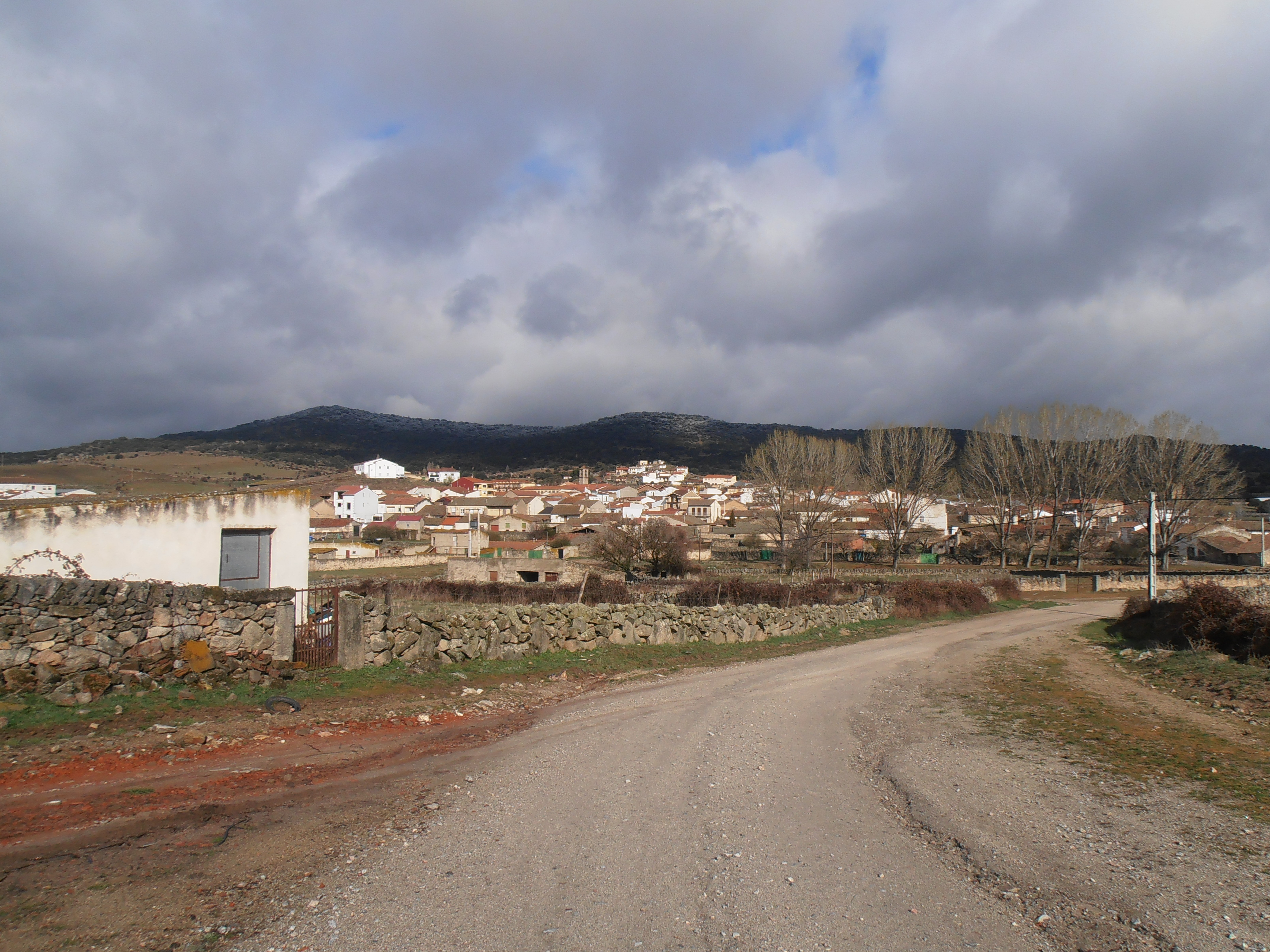 la piquera nevada